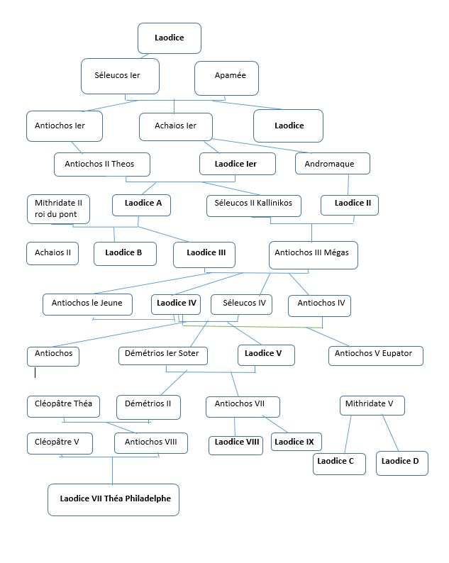 Généalogie reliant les Reines/Princesses Laodice